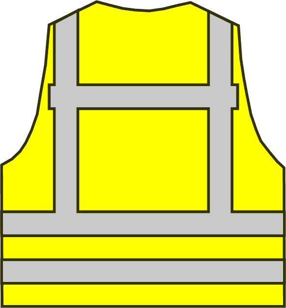 Funktionsweste FF RD KatS gelb